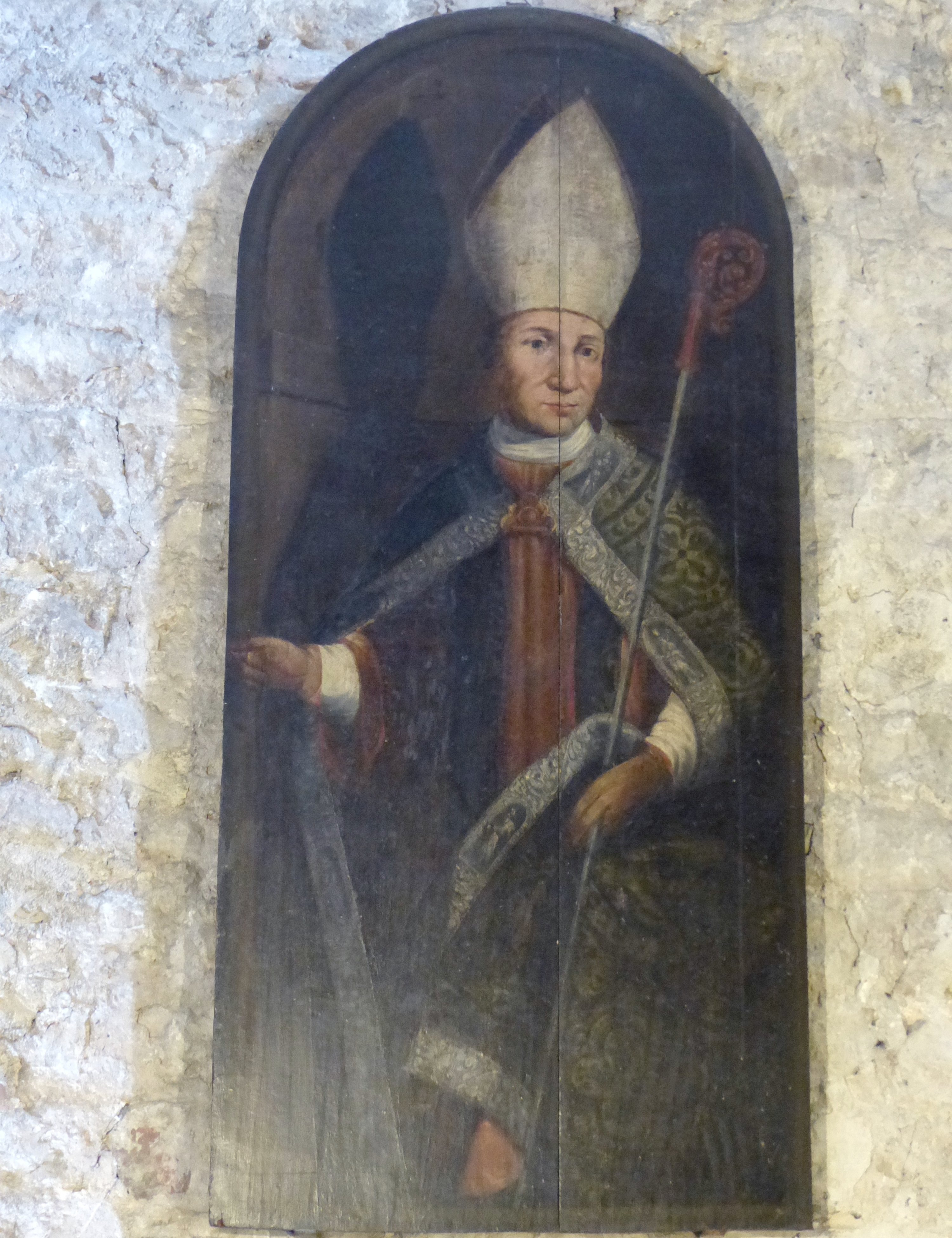 Vence (Alpes-Maritimes, France), cathédrale Nativité-de-Notre-Dame, intérieur; dans la chapelle du Saint-Sacrement, peinture à l'huile sur panneau cintré en bois représentant St Lambert.